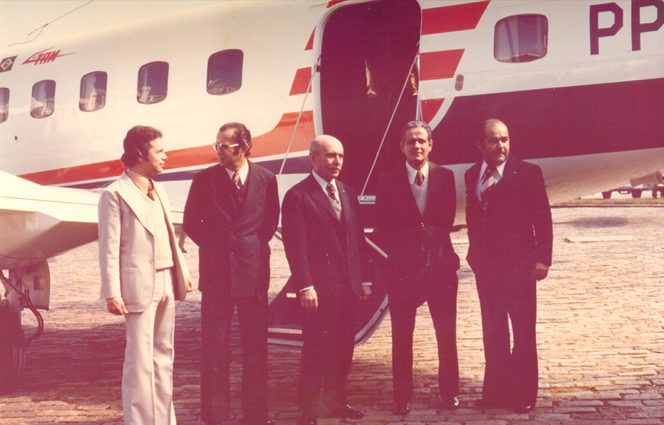 Historia de TAM.